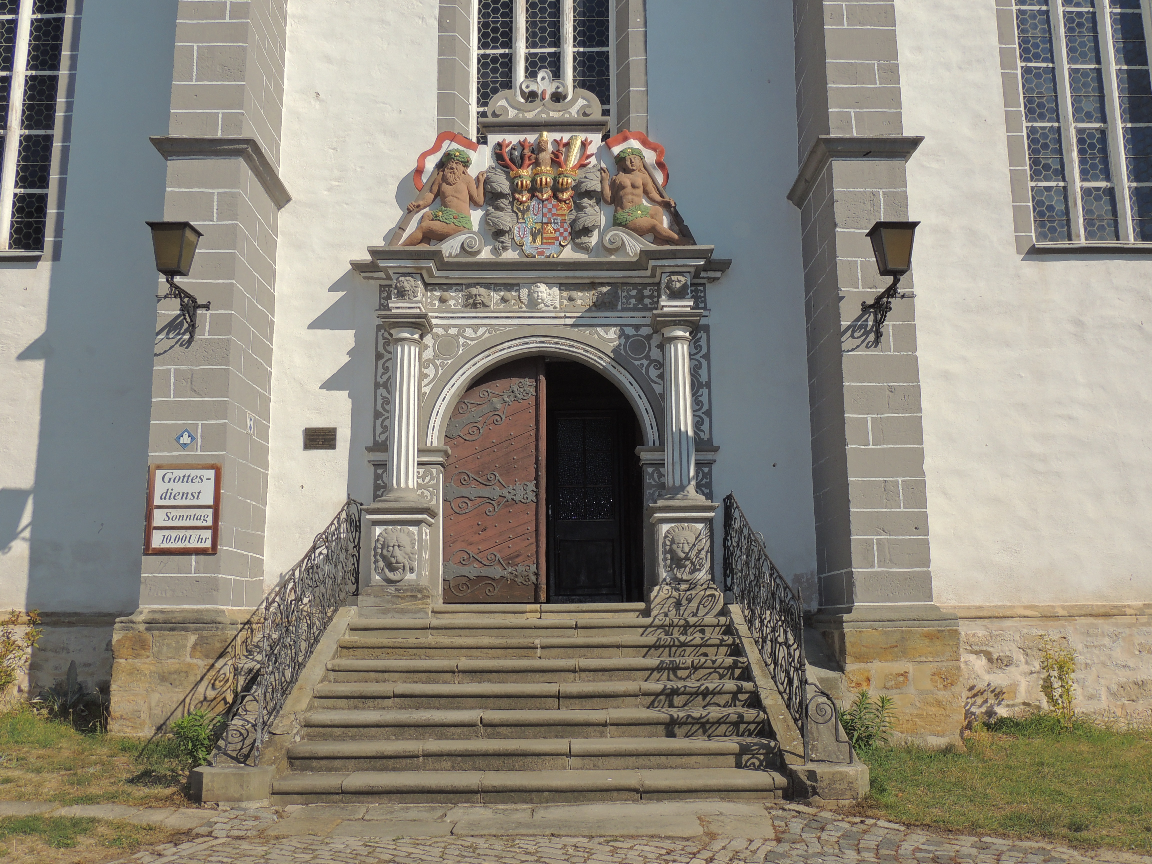 Portal der denkmalgeschützten Stadtkirche St. Andreas in Rudolstadt